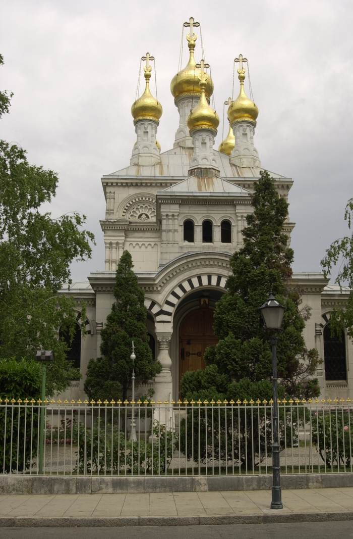 Église orthodoxe russe de Genève